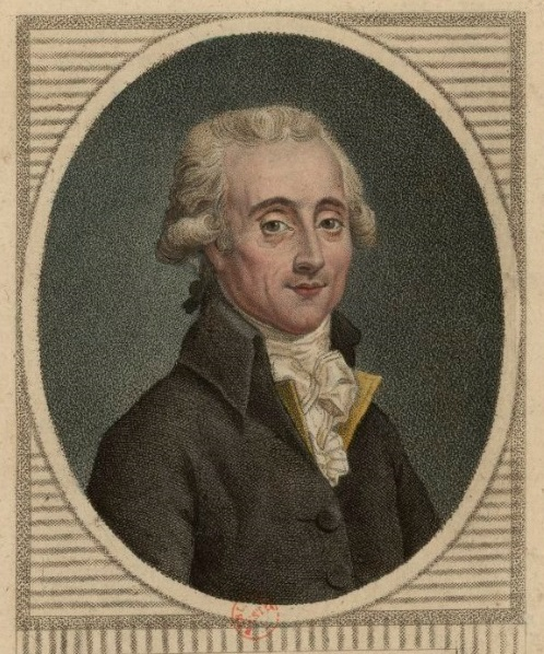 Georges Couthon : député du dép.t du Puy de Dôme à l'Assemblée nationale de 1791, et à la Convention de 1792